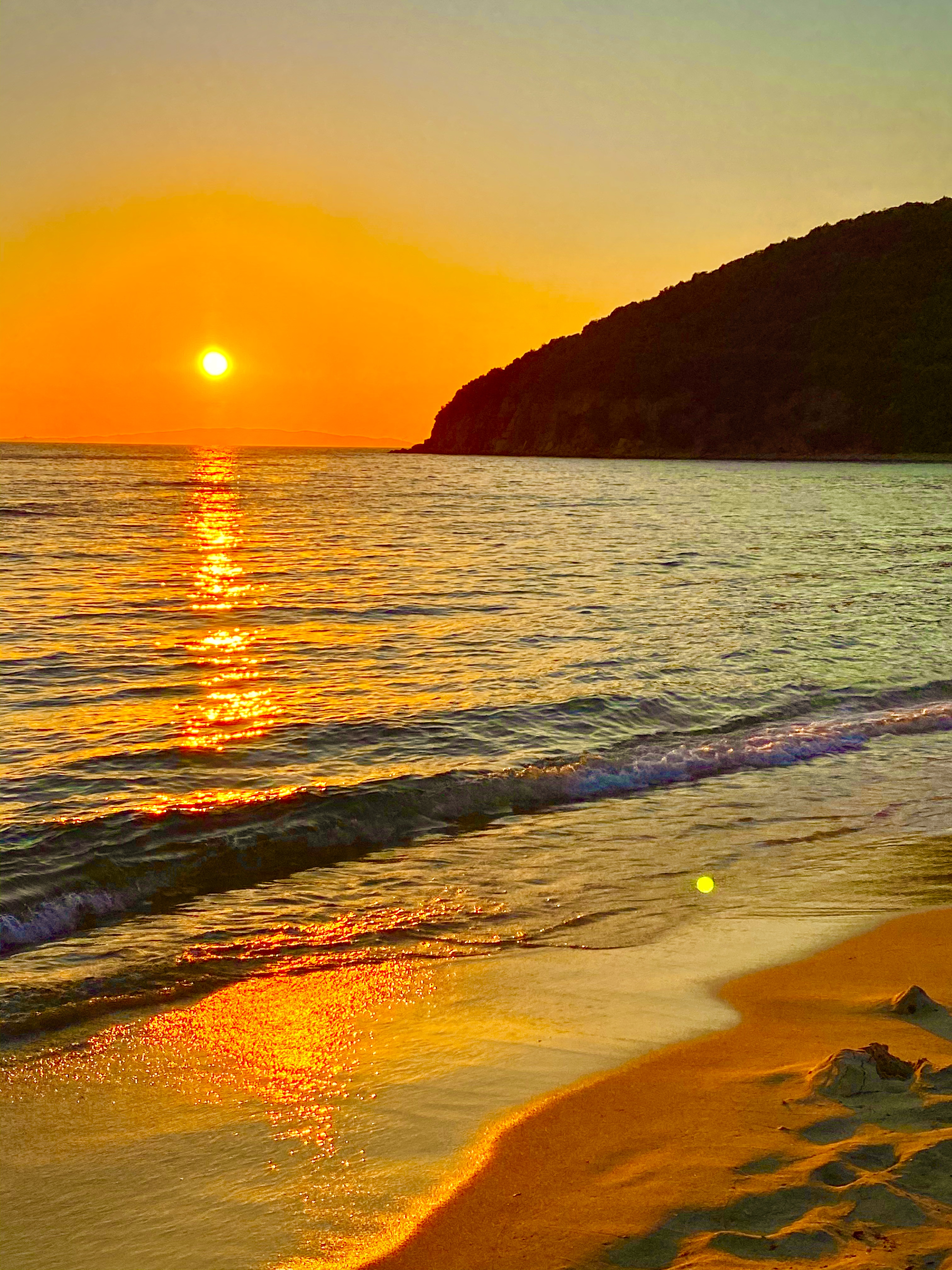 Cala Violina al tramonto.